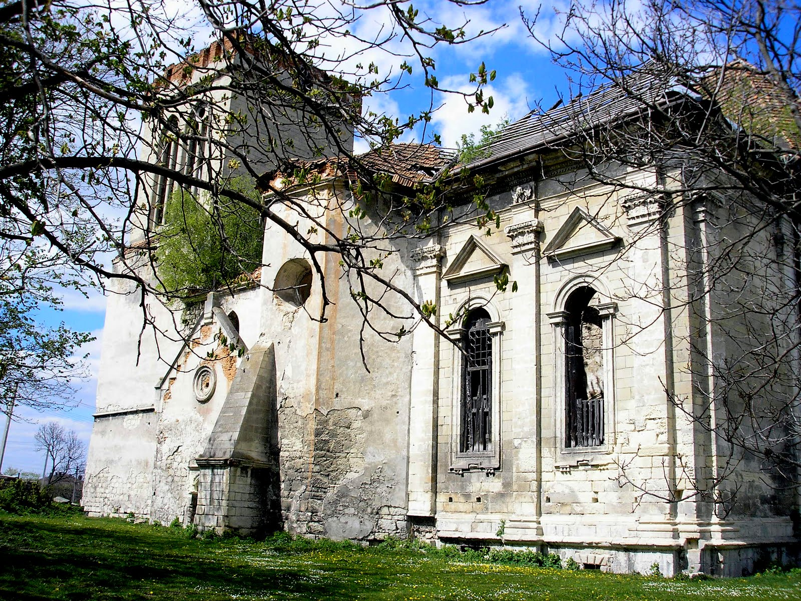 Костел (руїни), Підгайці, вул. Чапаєва